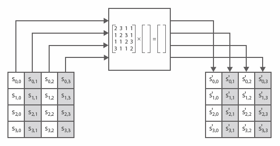 Монгол: Баганыг холих